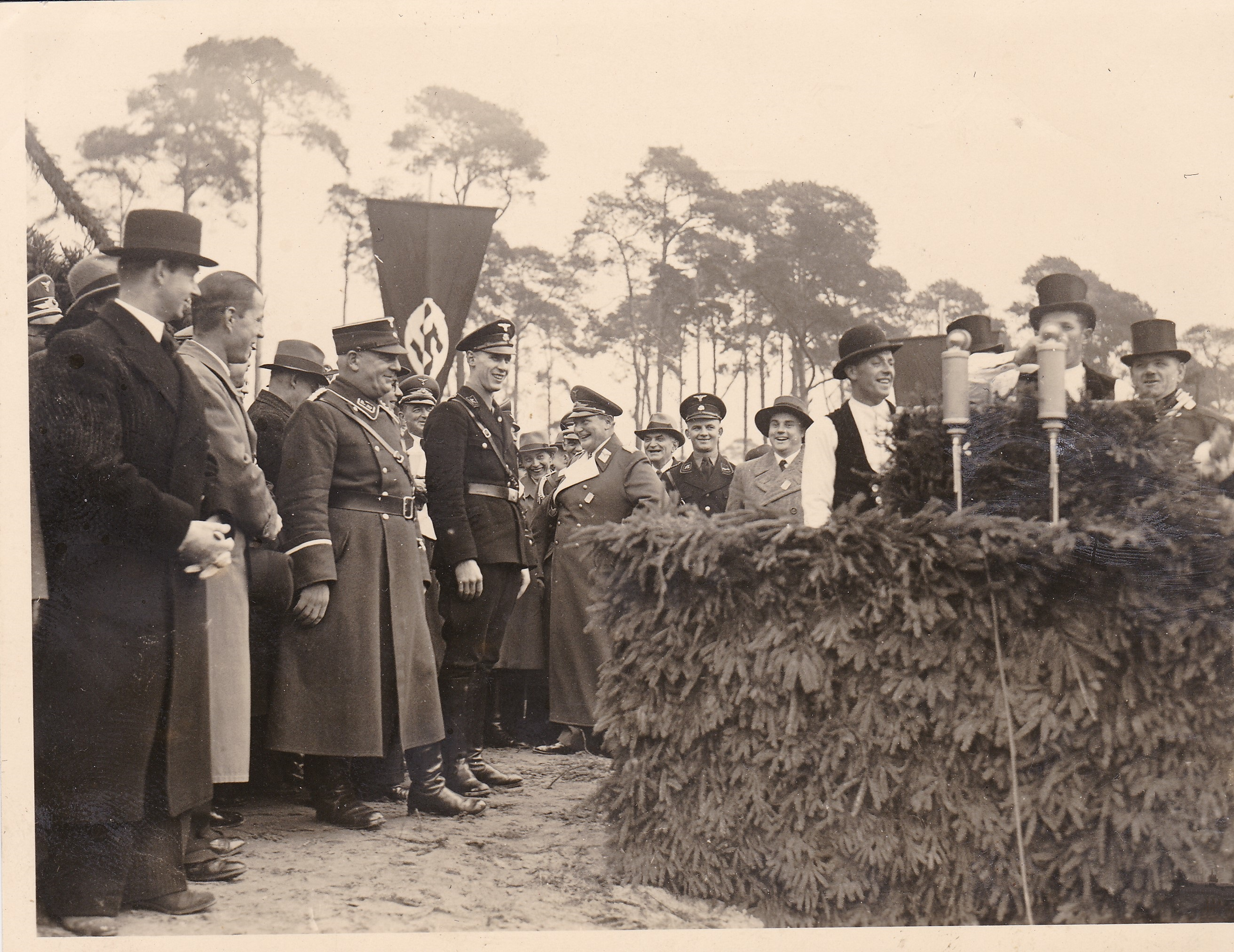 Grundsteinlegung der Kaserne Reinickendorf, heute Julius-Leber-Kaserne, um 1935